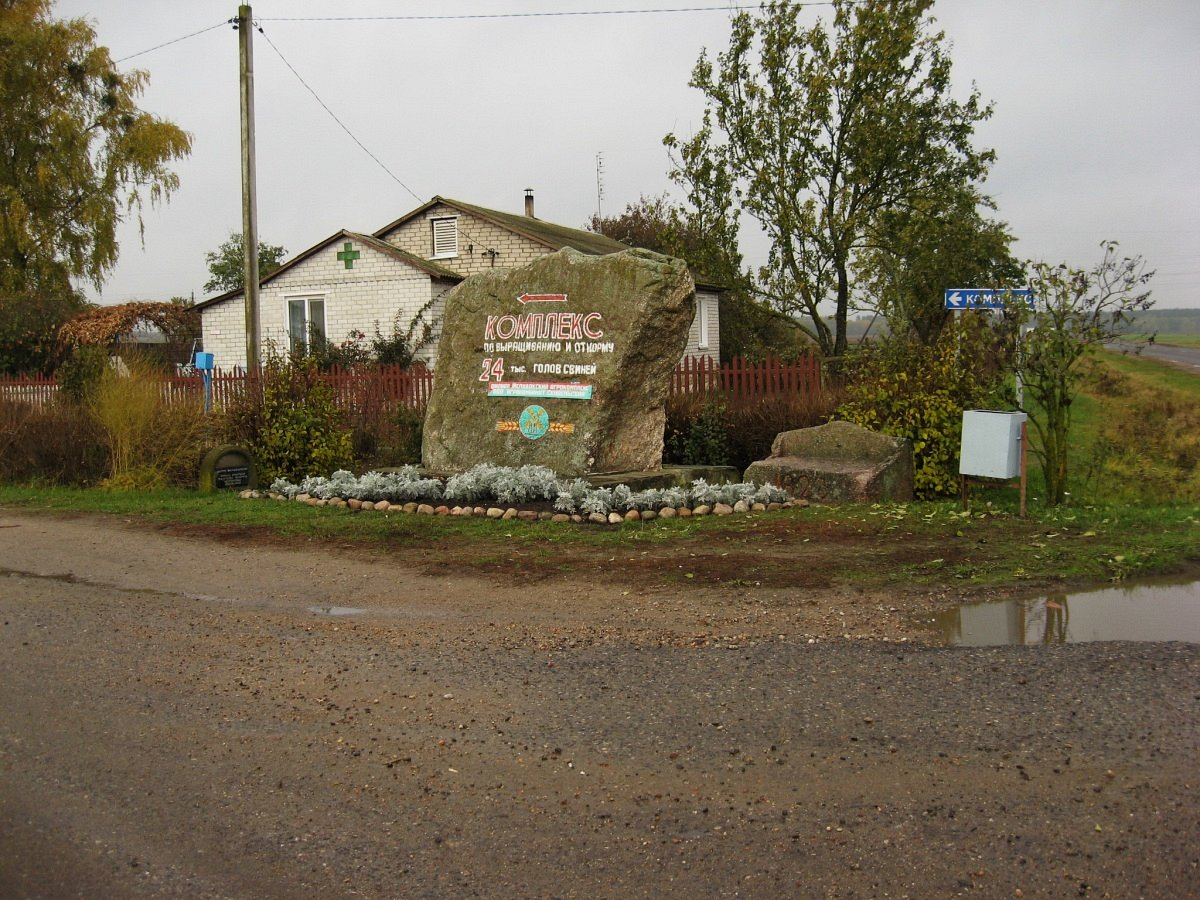 Фарны Канец. Фарнаканецкі валун